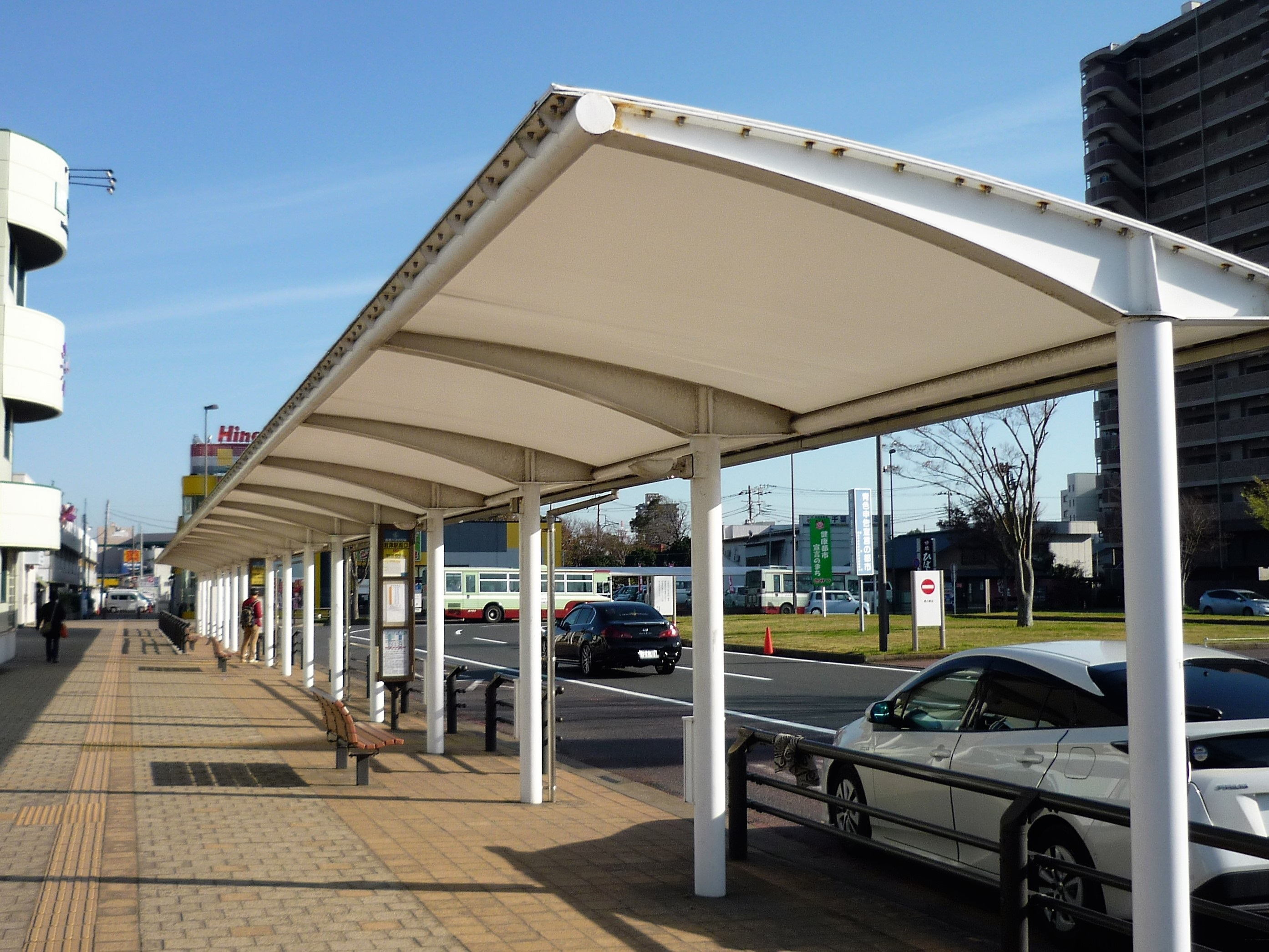 君津駅南口バス乗り場 Panasonic Lumix DMC-FS3